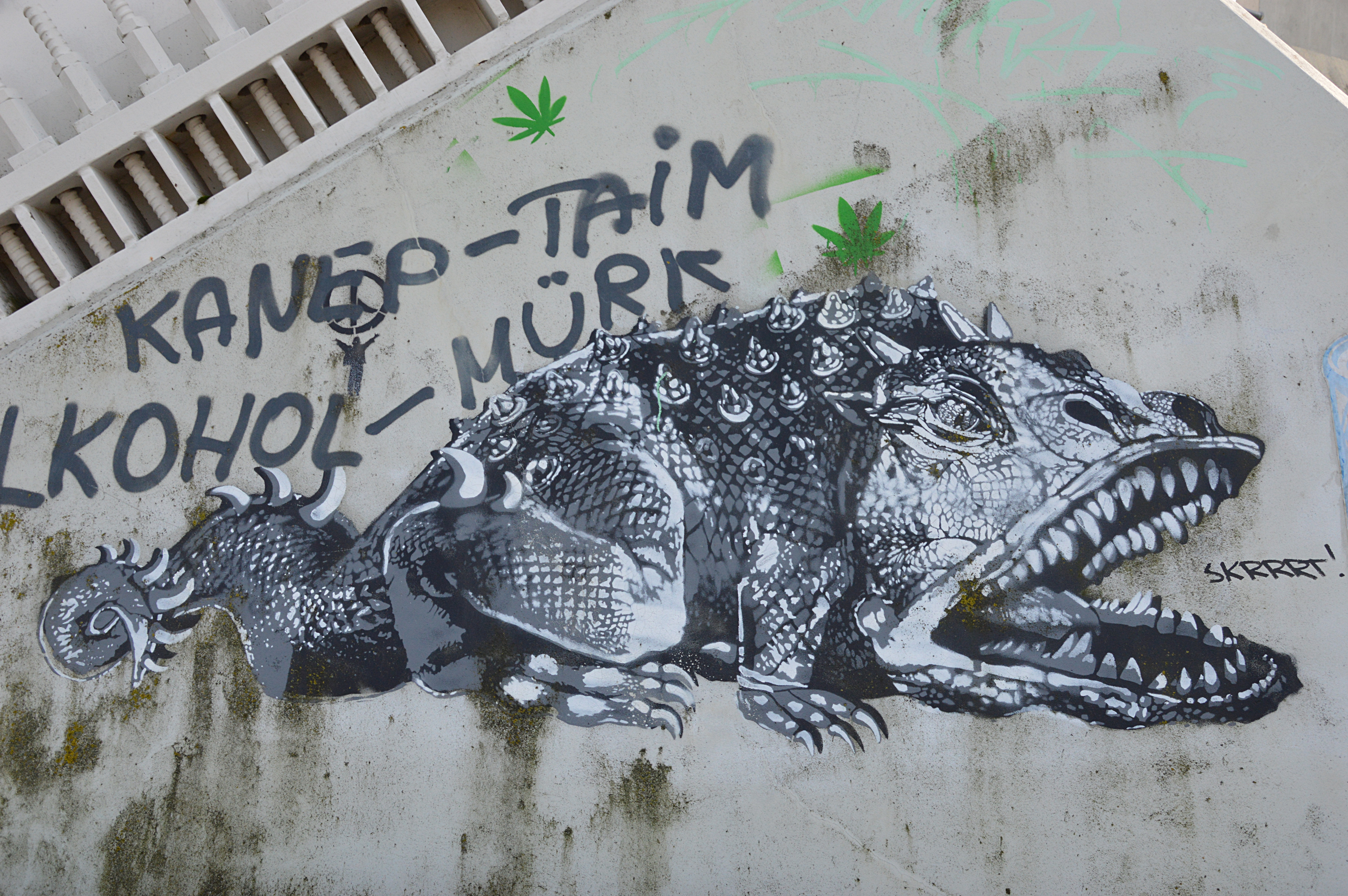 Edward von Lõngus, "Põhja konn".